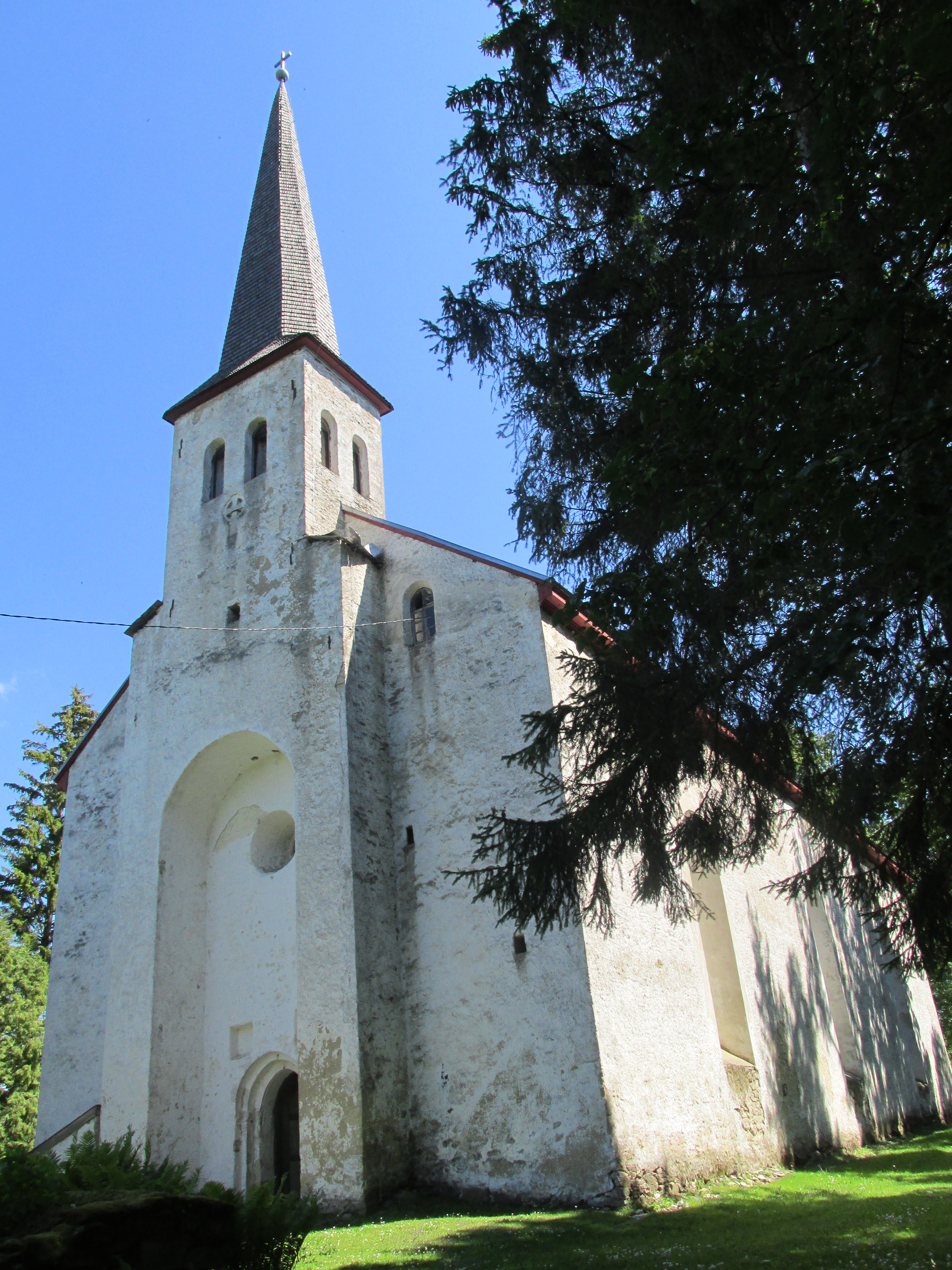 Martna kirik, vaade läänest